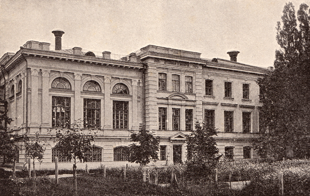 Чернігівська духовна семінарія (старе фото)